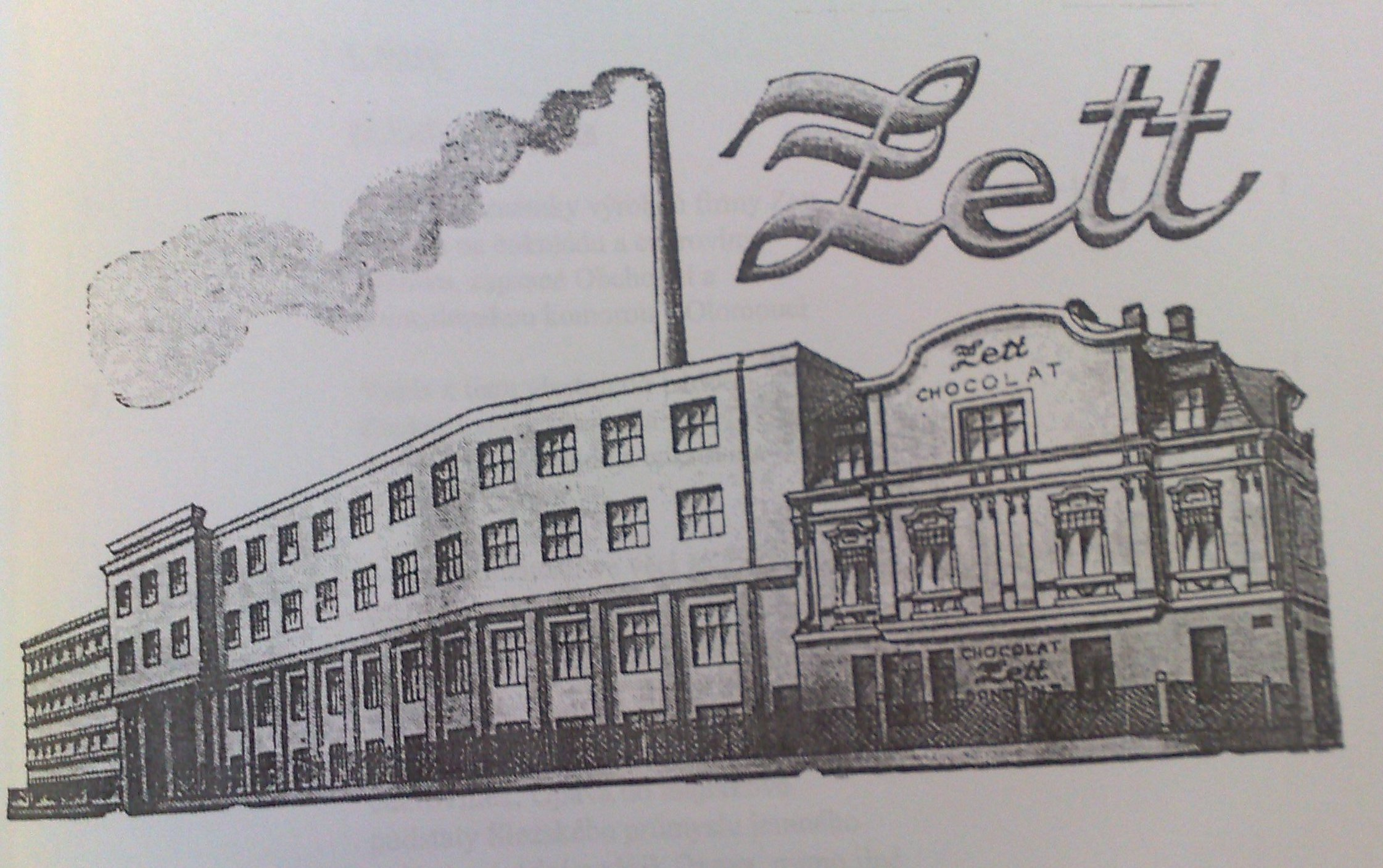 Takto vypadala budova čokoládovny ZETT v r. 1927. Všimněte si, že na kresbě je budova větší, než ve skutečnosti. V každém patře je ve skutečnosti jen 11 oken...